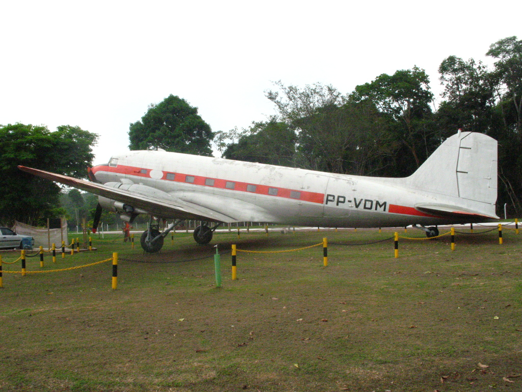 Aeronave Douglas na entrada do Aeroporto de Carajás, cidade de Parauapebas(PA)